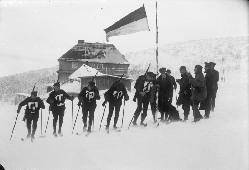 Reichswehrübungen im Riesengebirge! Start zum Patrouillenkauf an der schlesischen Baude im Riesengebirge.